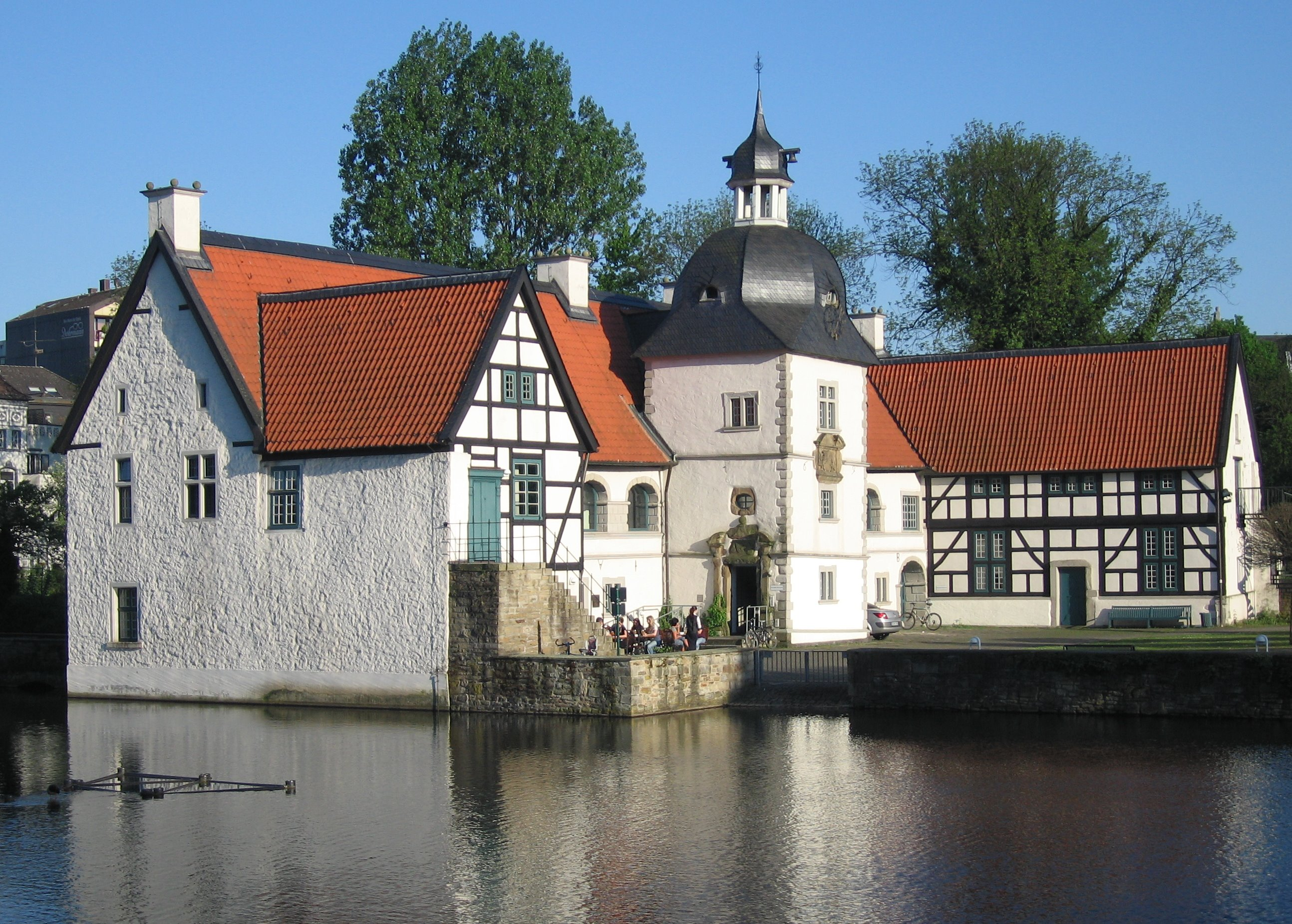 Schloß Rodenberg